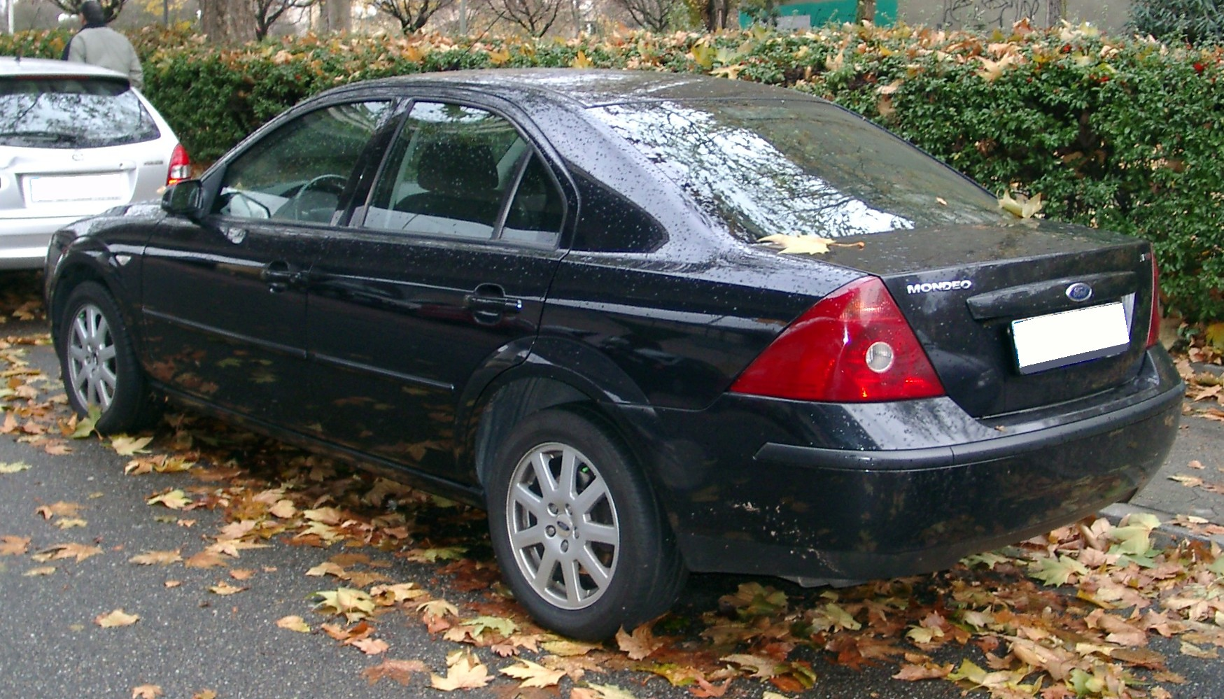 Ford Mondeo 2. Generation